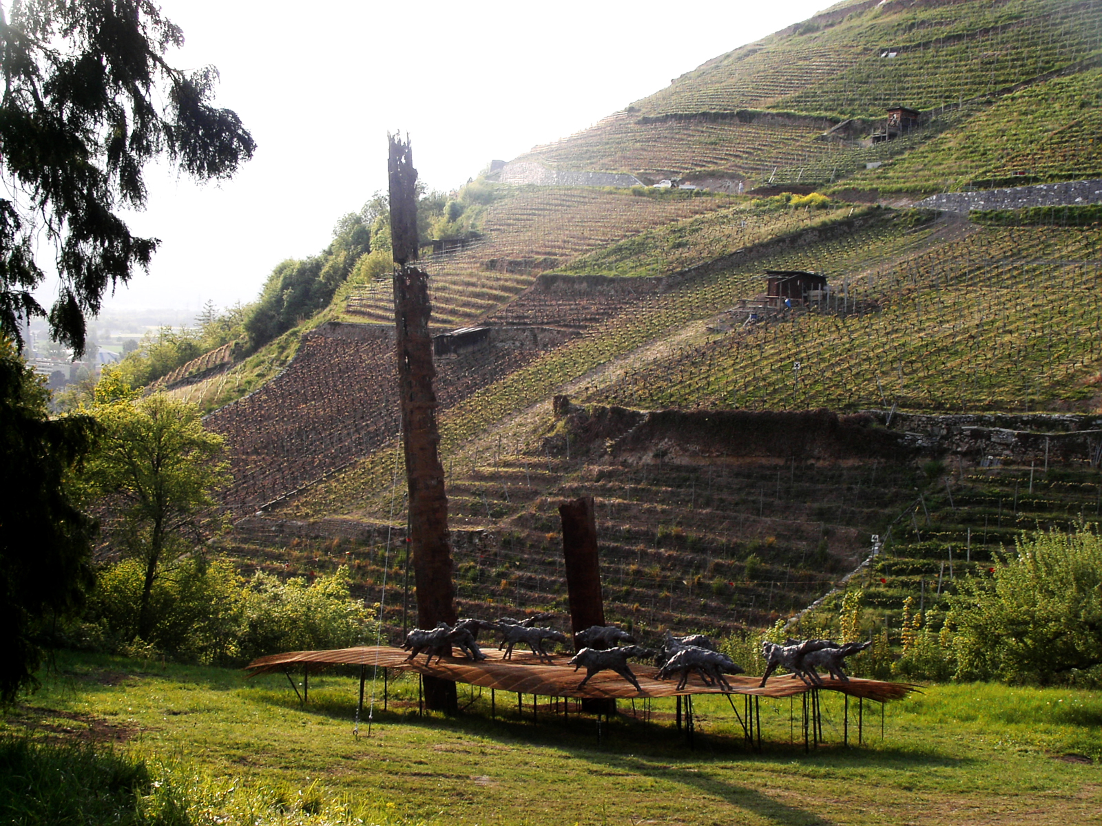 Oeuvre crée pour l'exposition Bex&Arts 2008, Bex, Vaud, Suisse